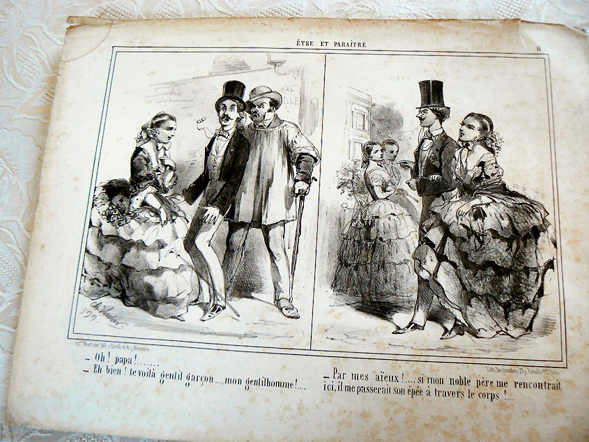 Litographie par Charles Vernier. Des gentilhommes courtisent des grisettes.